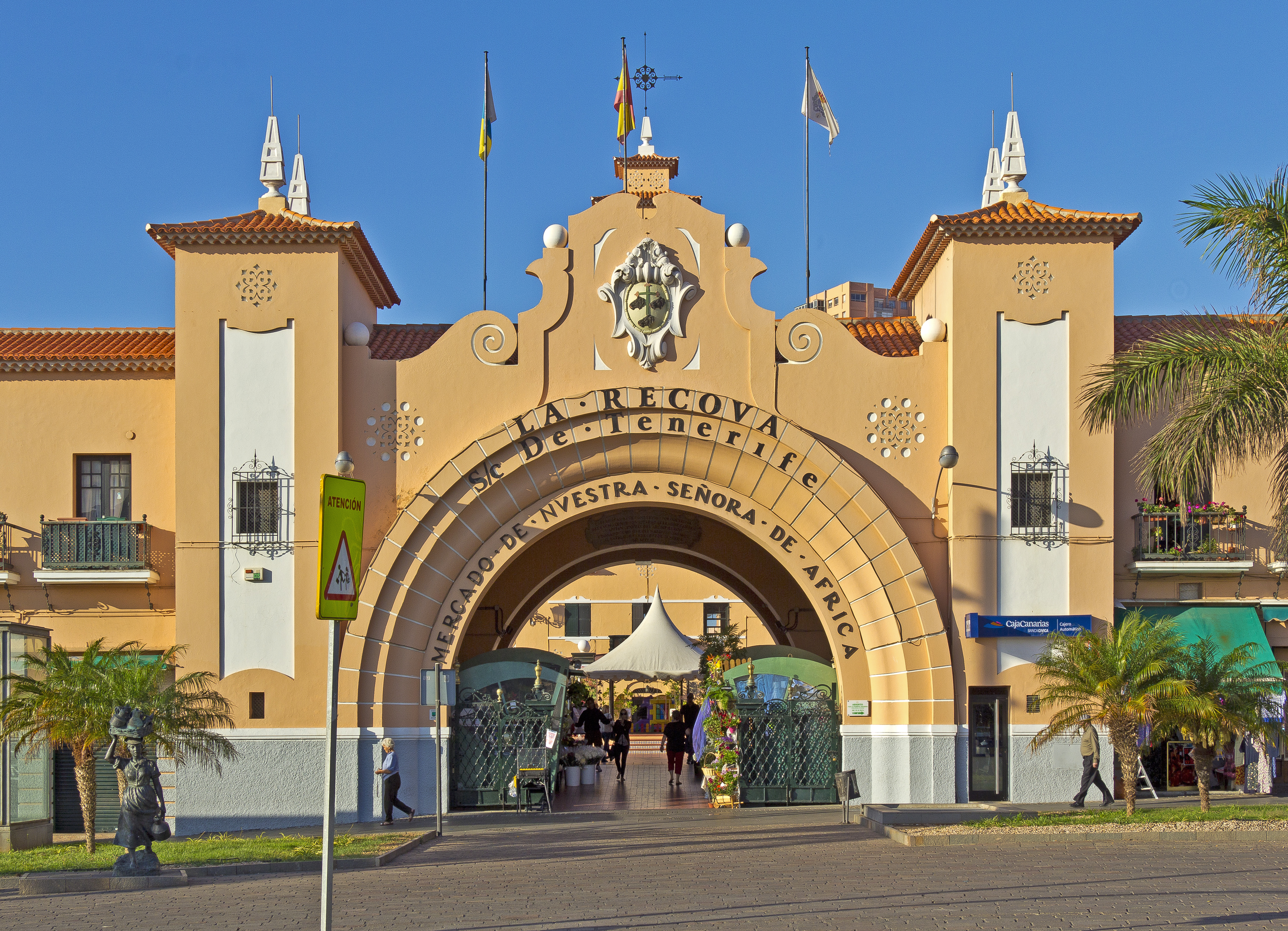 Der „Mercado de Nuestra Señora de Africa“ wurde von dem Architekten José Enrique Marrero Regalado entworfen. Der Bau wurde im Jahr 1943 fertiggestellt. Das Gebäude beherbergt den Markt der Stadt Santa Cruz de Tenerife.